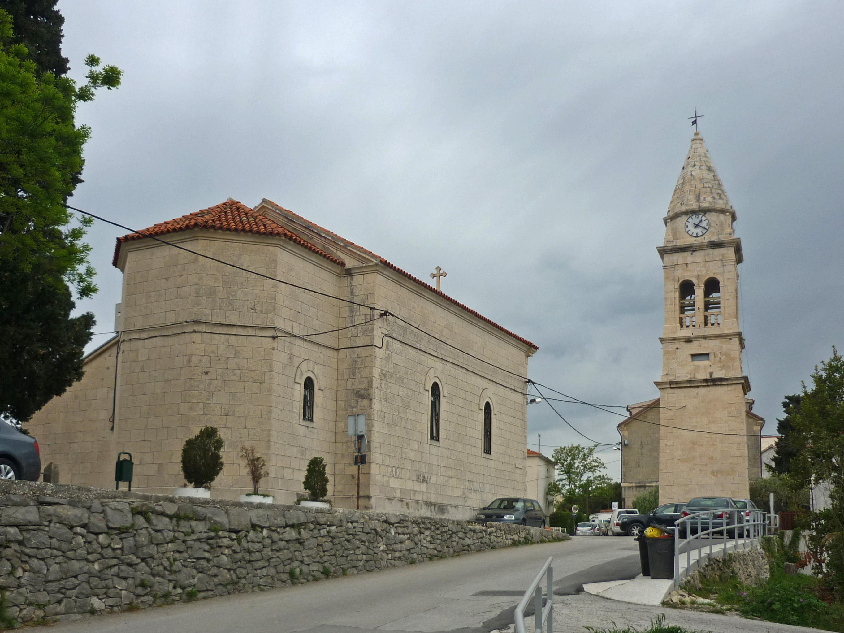 Laurentiuskirche (Sv. Lovro) in Stobreč